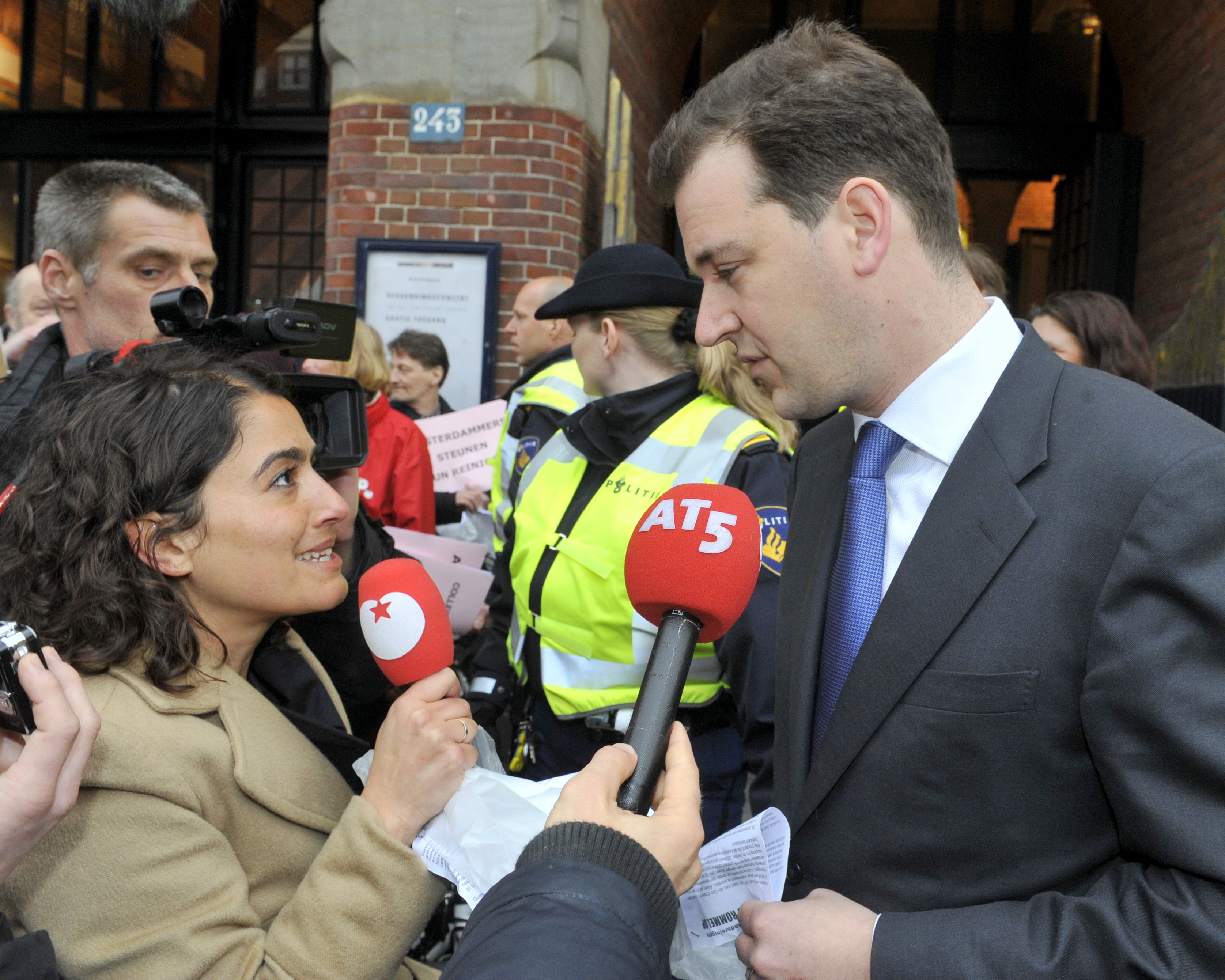 Sadet Karabulut (SP) en Lodewijk Asscher (PvdA) AMSTERDAM - de actievoerders vinden dat de gemeente wel veel geld uit geeft om een vorkje te prikken in de beurs van Berlage bij de start van de Giro d'Italia, maar geen geld om de reinigers die dit evenement mogelijk maken een fatsoenlijk salaris te betalen.